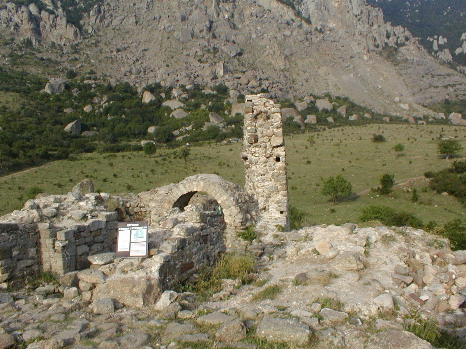 Крепость "Фуна", август 2002